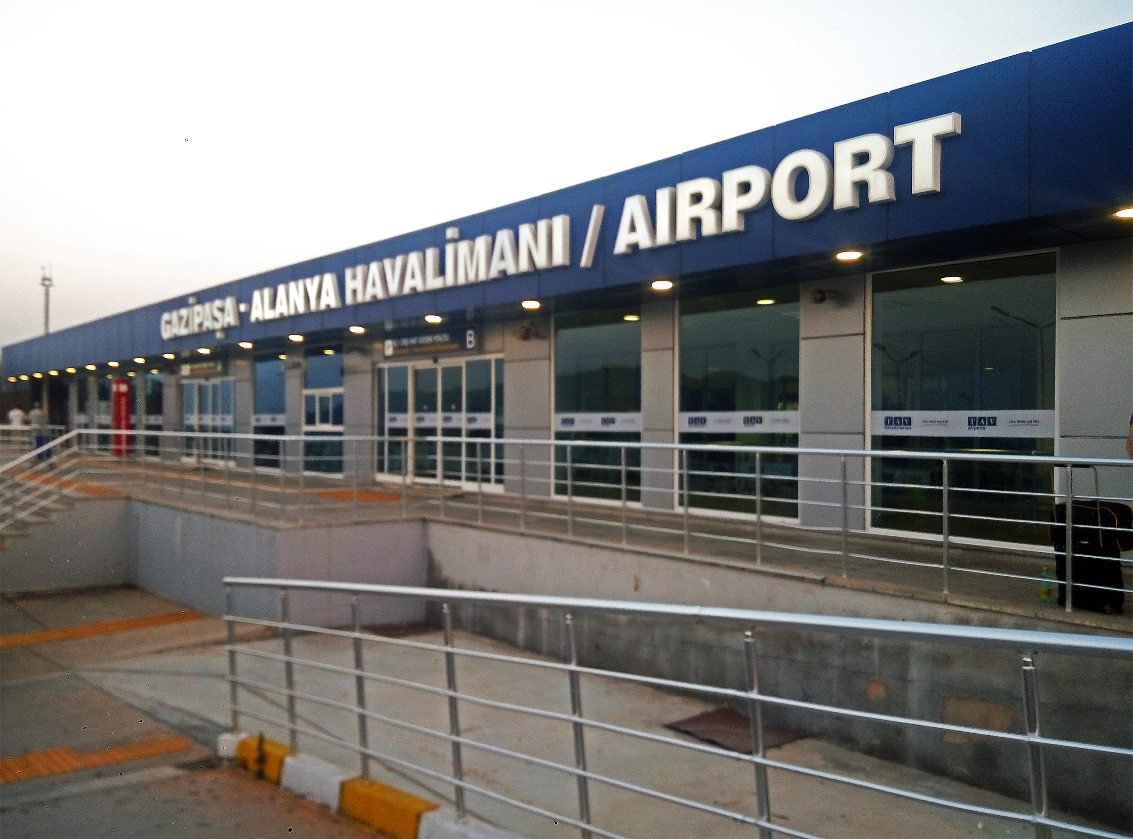 Терминал аэропорта Газипаша-Аланья, Турция